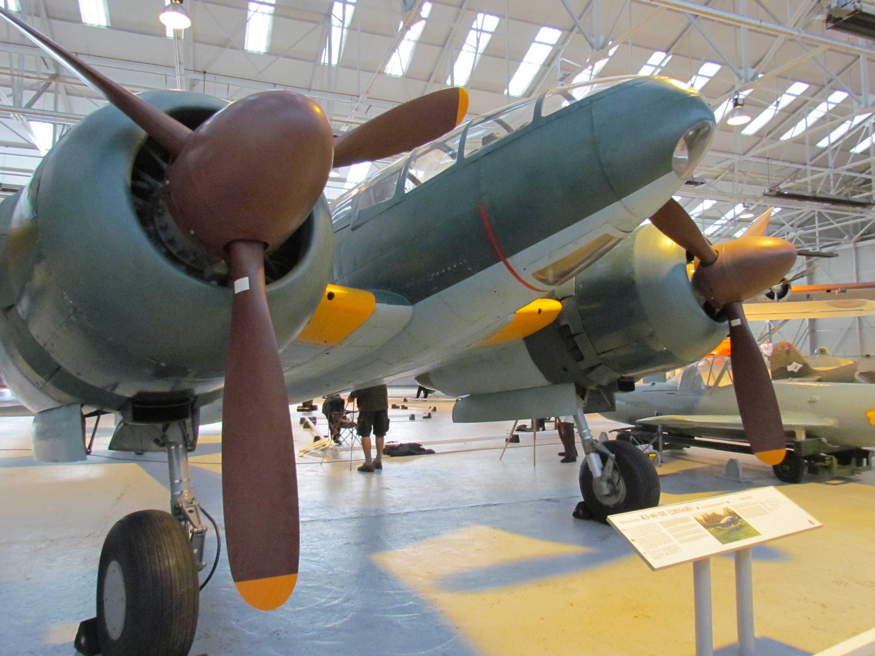 Mitsubishi K1-46